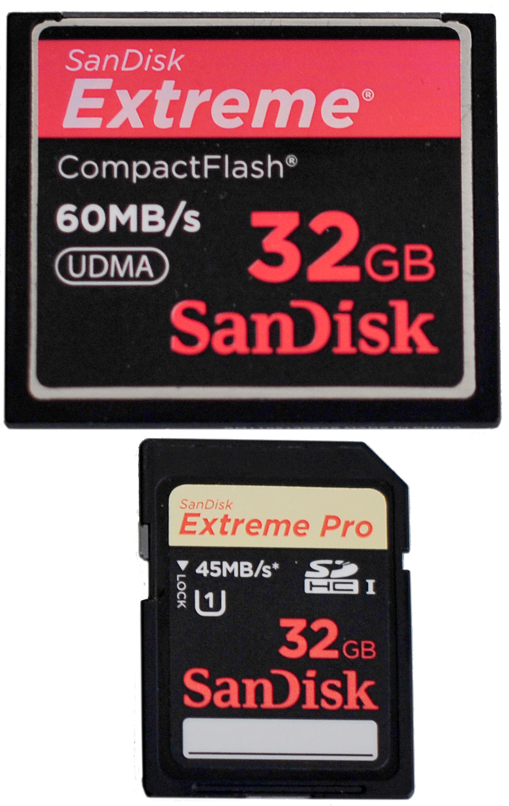 moderne Speicherkarten im Jahr 2012